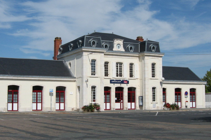 Bâtiment voyageurs de la gare de Luçon, côté cour.